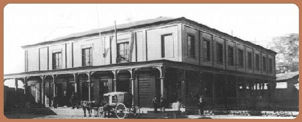 Fotografía de la estación Barón en 1860, fue la primera estación ferroviaria de la zona central de Chile y se ubicaba sobre un puente, en la desembocadura del estero Delicias, que ahora fluye bajo el bandejón central de la actual avenida Argentina.